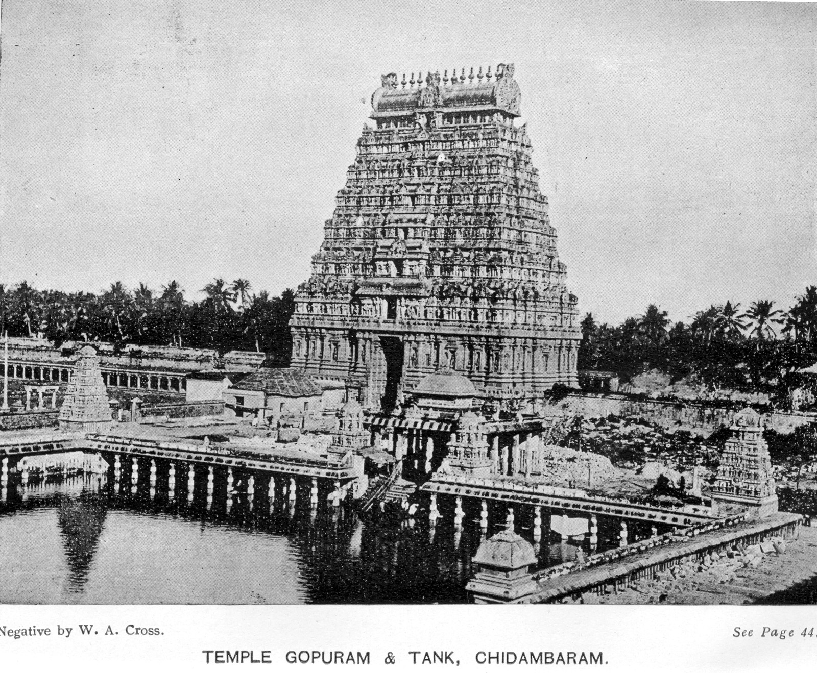 Chidambaram